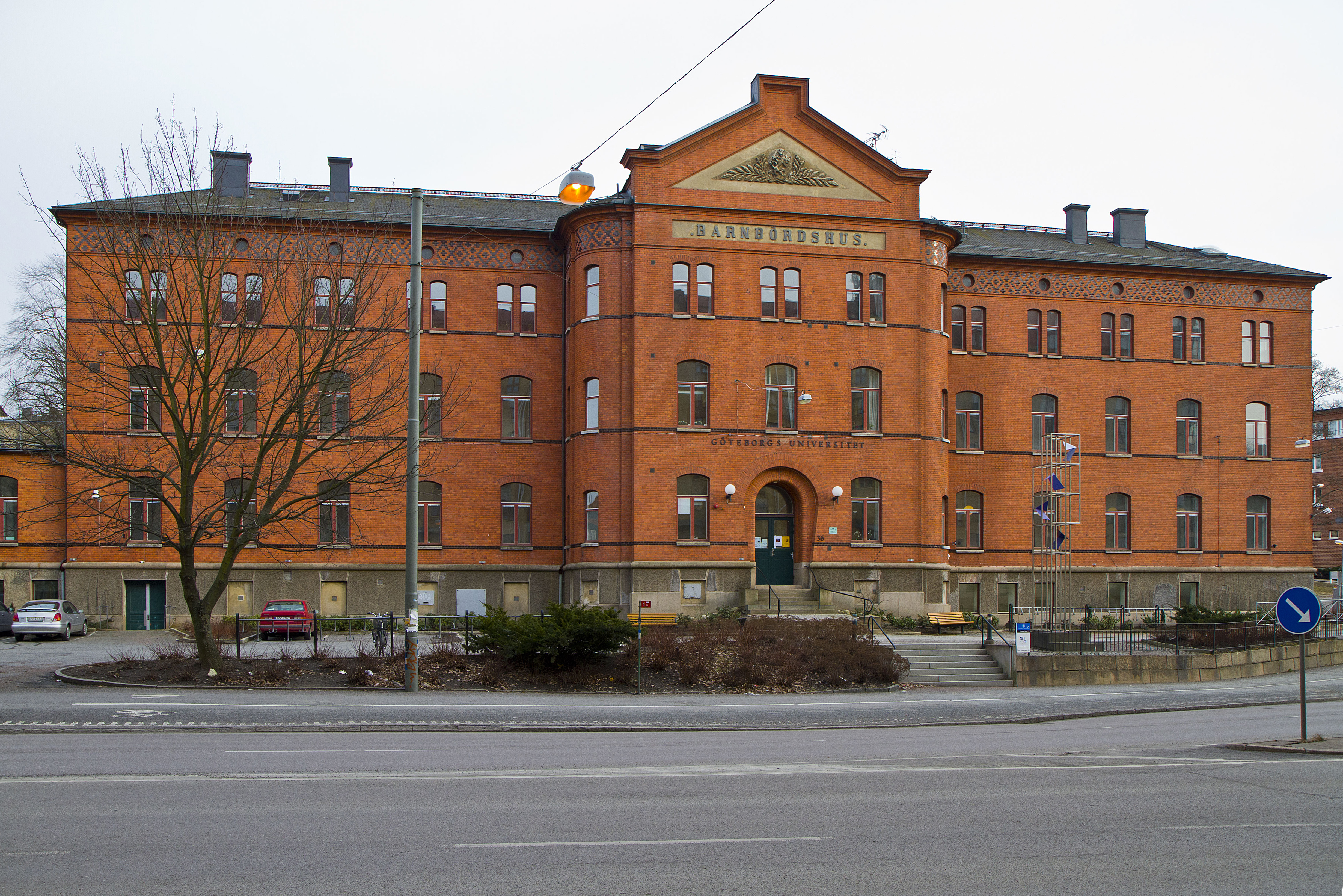 Barnbördshuset i Annedal, Göteborg. Byggnadsår 1896–1900. Arkitekt Axel Kumlien